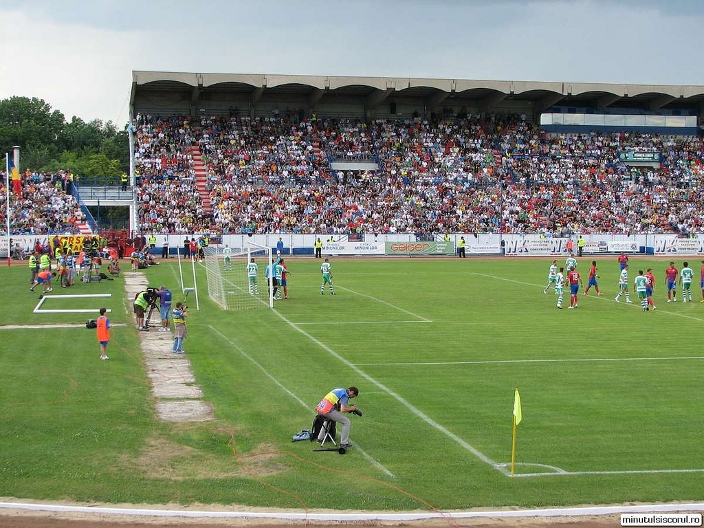 Stadionul Municipal de Sibiu durante un Vointa Sibiu - Steaua